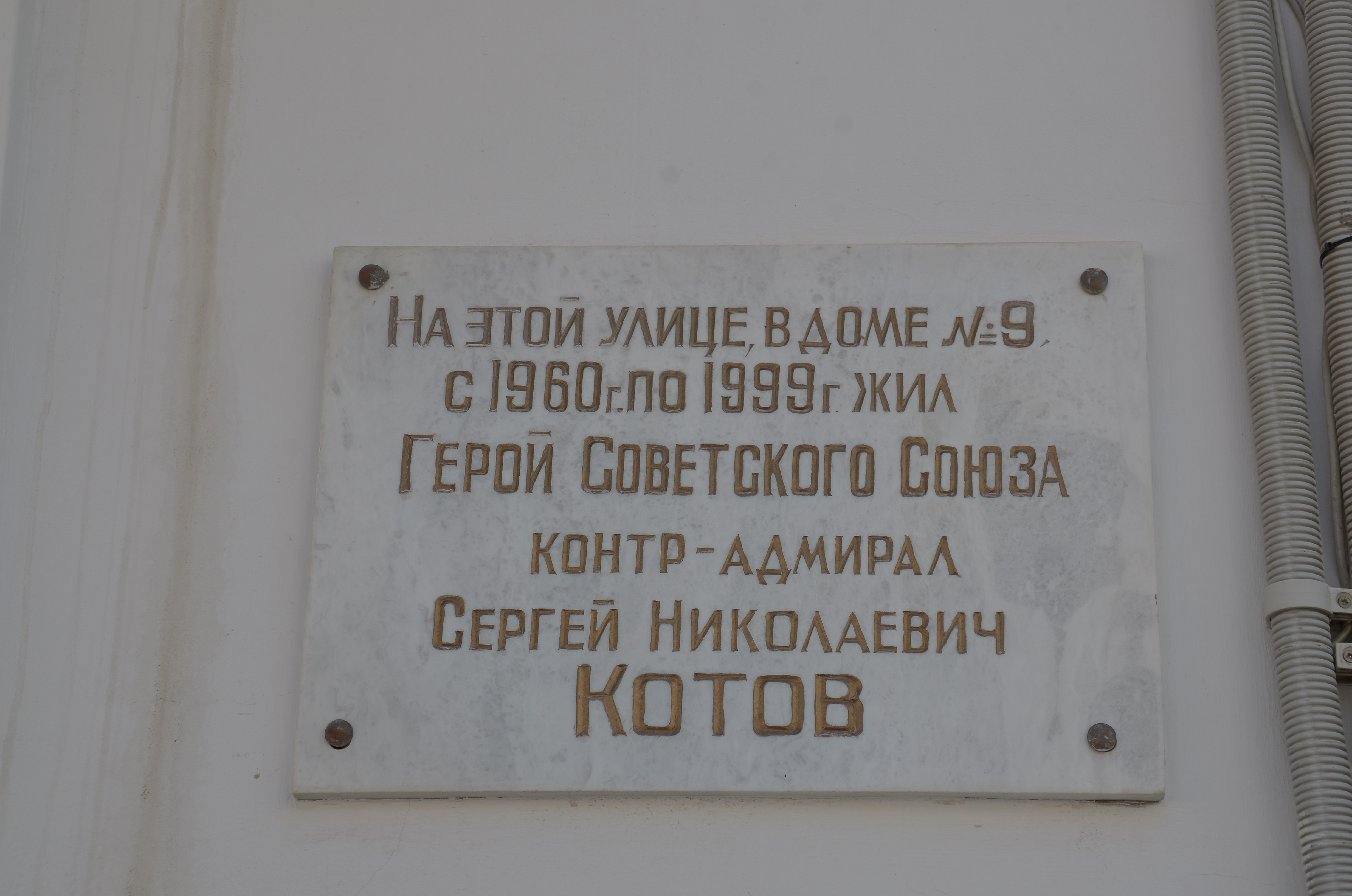 Феодосия